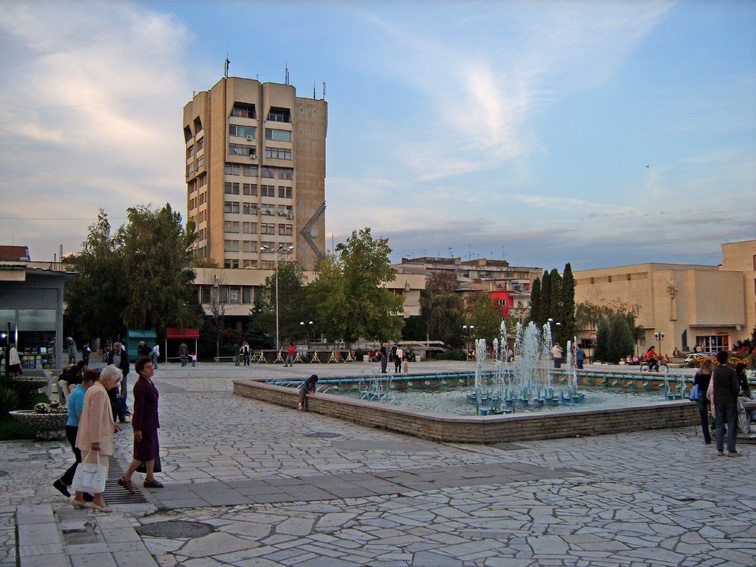 Площад "Георги Измирлиев" в Горна Оряховица.